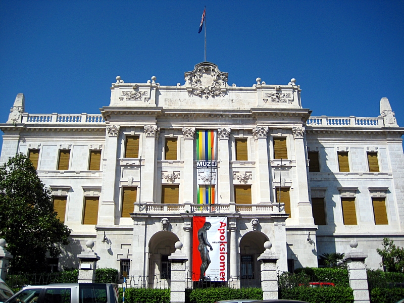 Pomorski i povijesni muzej Hrvatskog primorja u Rijeci